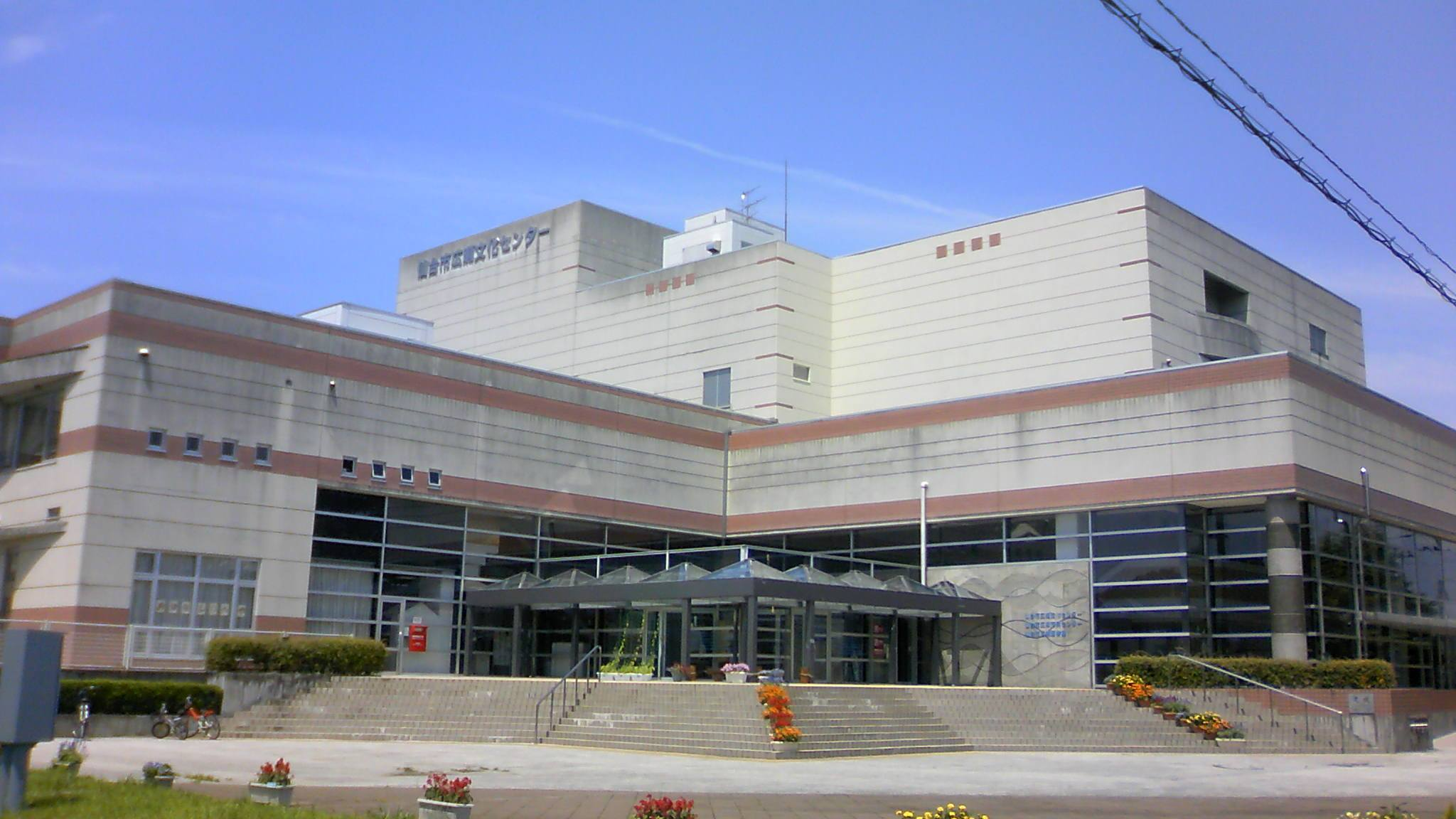 仙台市広瀬図書館